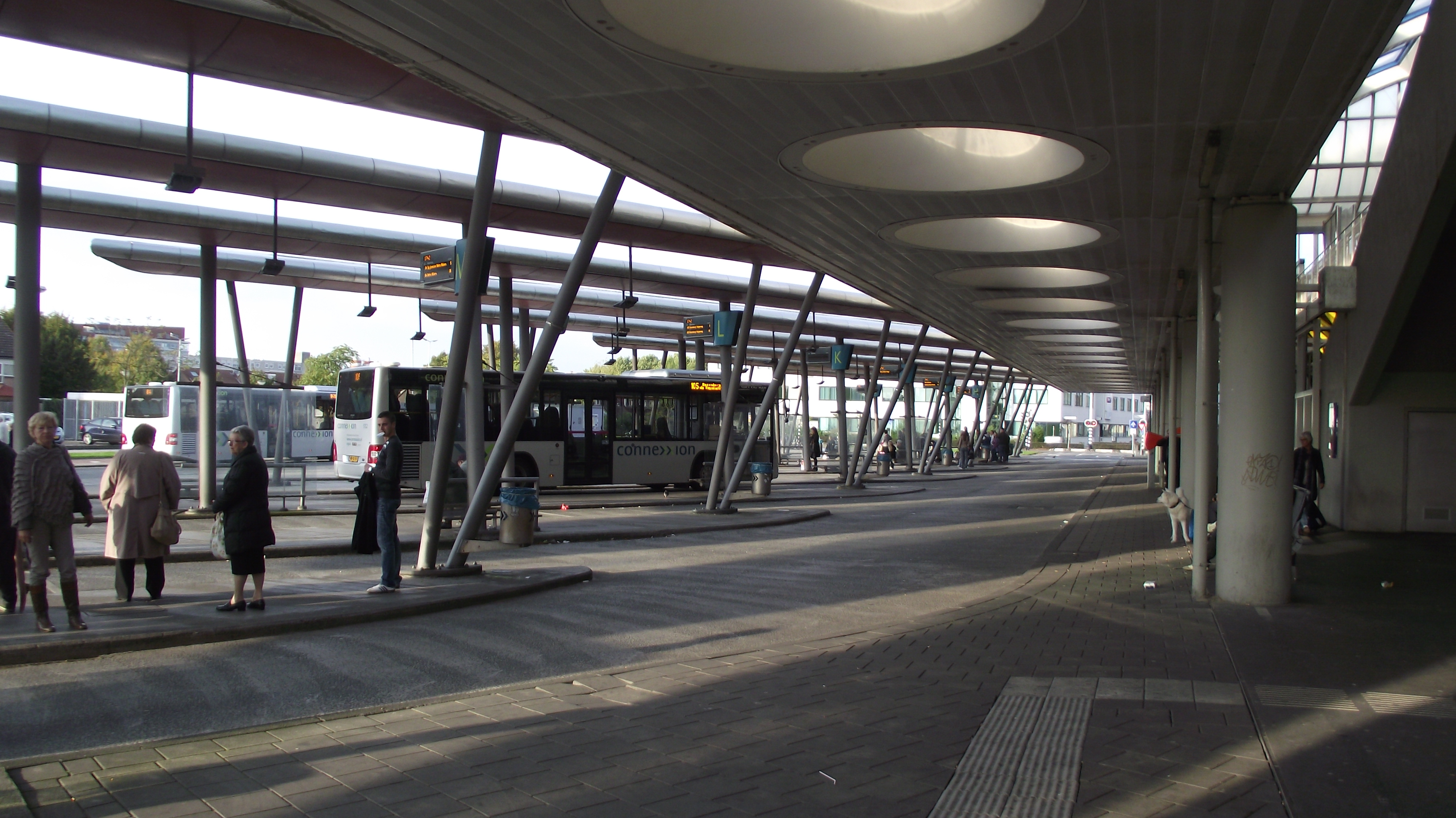 Dit is het busstation vanwaar de bussen naar Putte Voorne vertrekken in aansluiting op de metro Spijkenisse Centrum